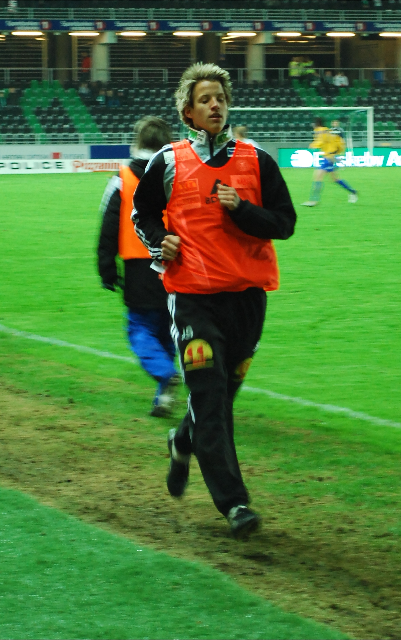 Thomas Lehne Olsen, fotballspiller hos Hamarkameratene.